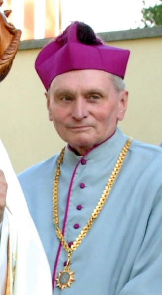 Kanovník František Opletal, 8. červen 2007, Litoměřice